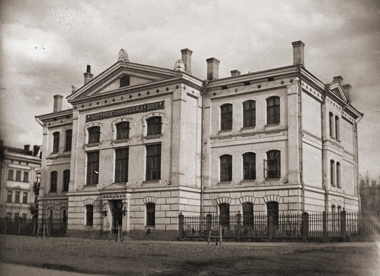 Фото здания шведской женской гимназии в Выборге конца 19 века